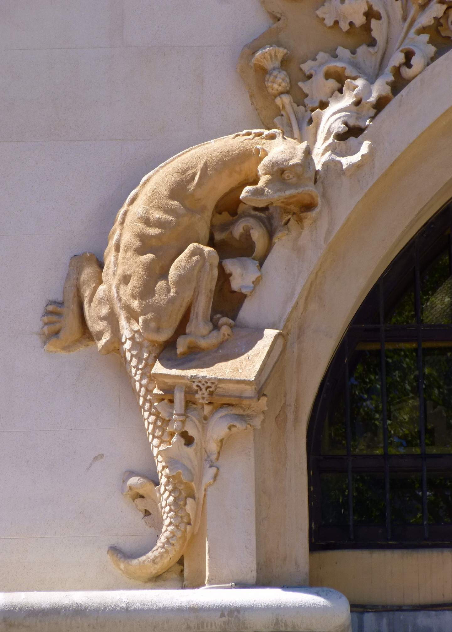 Iglesia de Santa Teresa y San José (PP Carmelitas Descalzos), en Madrid